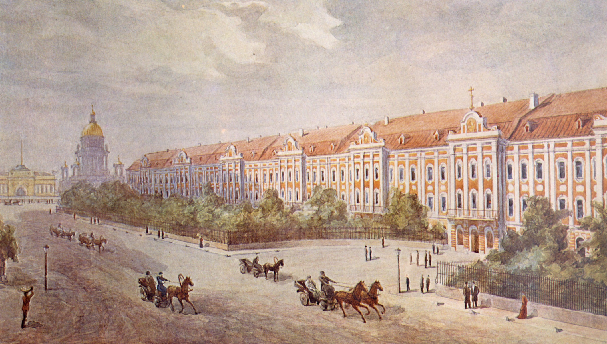 Здание Двенадцати коллегий в начале XIX века